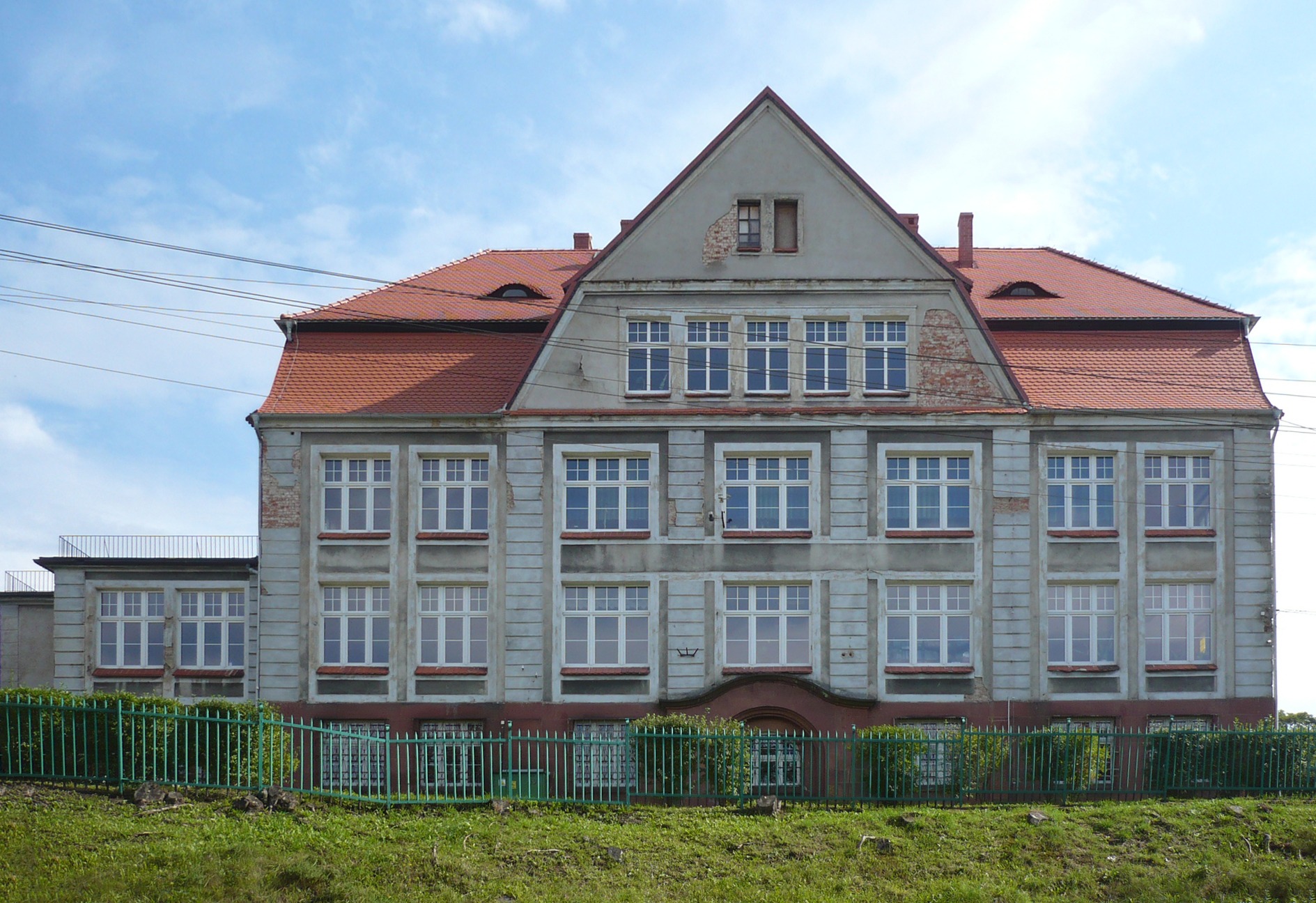 Nowa Ruda. Gimnazjum Nr 1